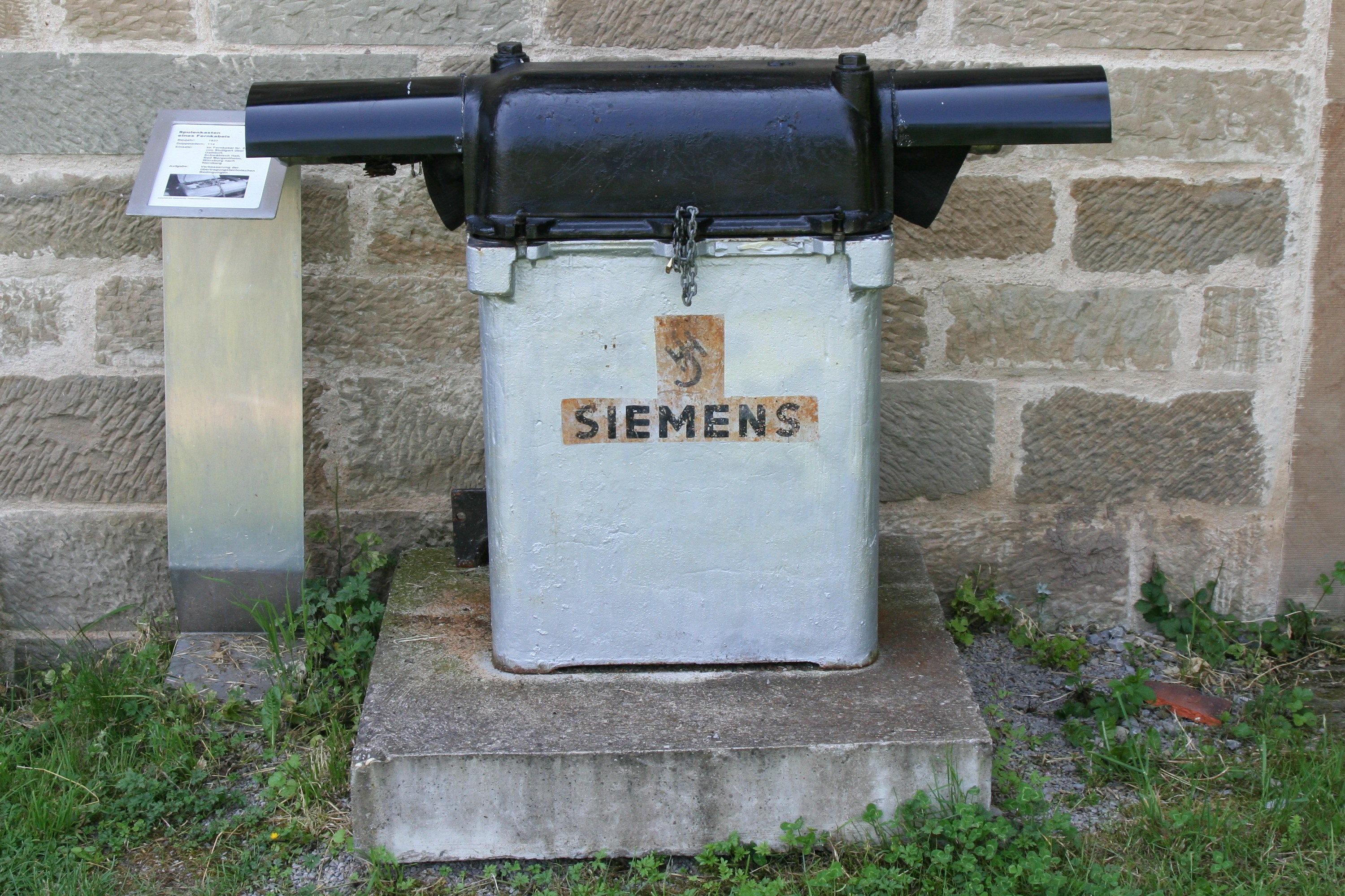 Spulenkasten eines Fernkabels von 1937, ursprünglich im Fernkabel Nr. 231 von Stuttgart über Gaildorf–Schwäbisch Hall–Bad Mergentheim–Würzburg nach Nürnberg. Jetzt im Hohenloher Freilandmuseum Wackershofen